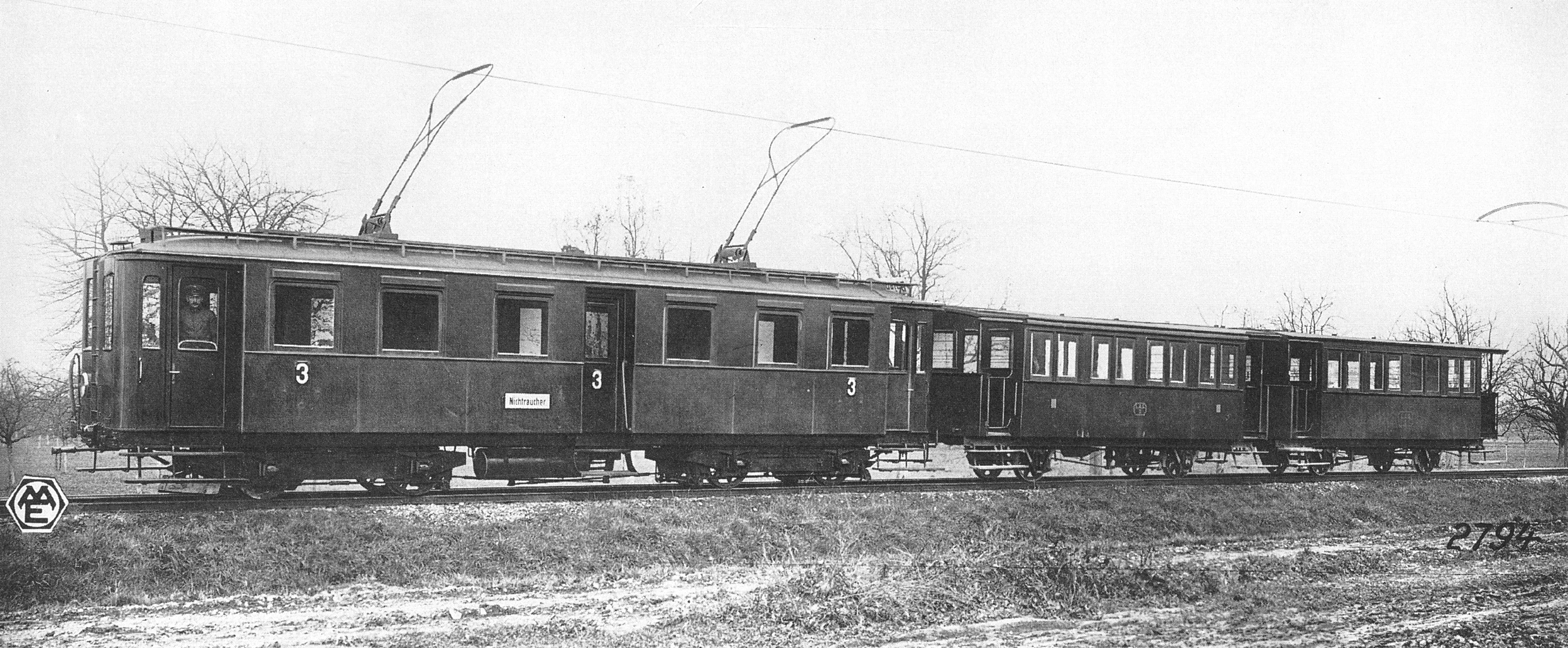 elektrischer Triebwagen der Bahnstrecke Ravensburg–Weingarten, LAG 800–804, DRB-/DB-Baureihe ET 196.